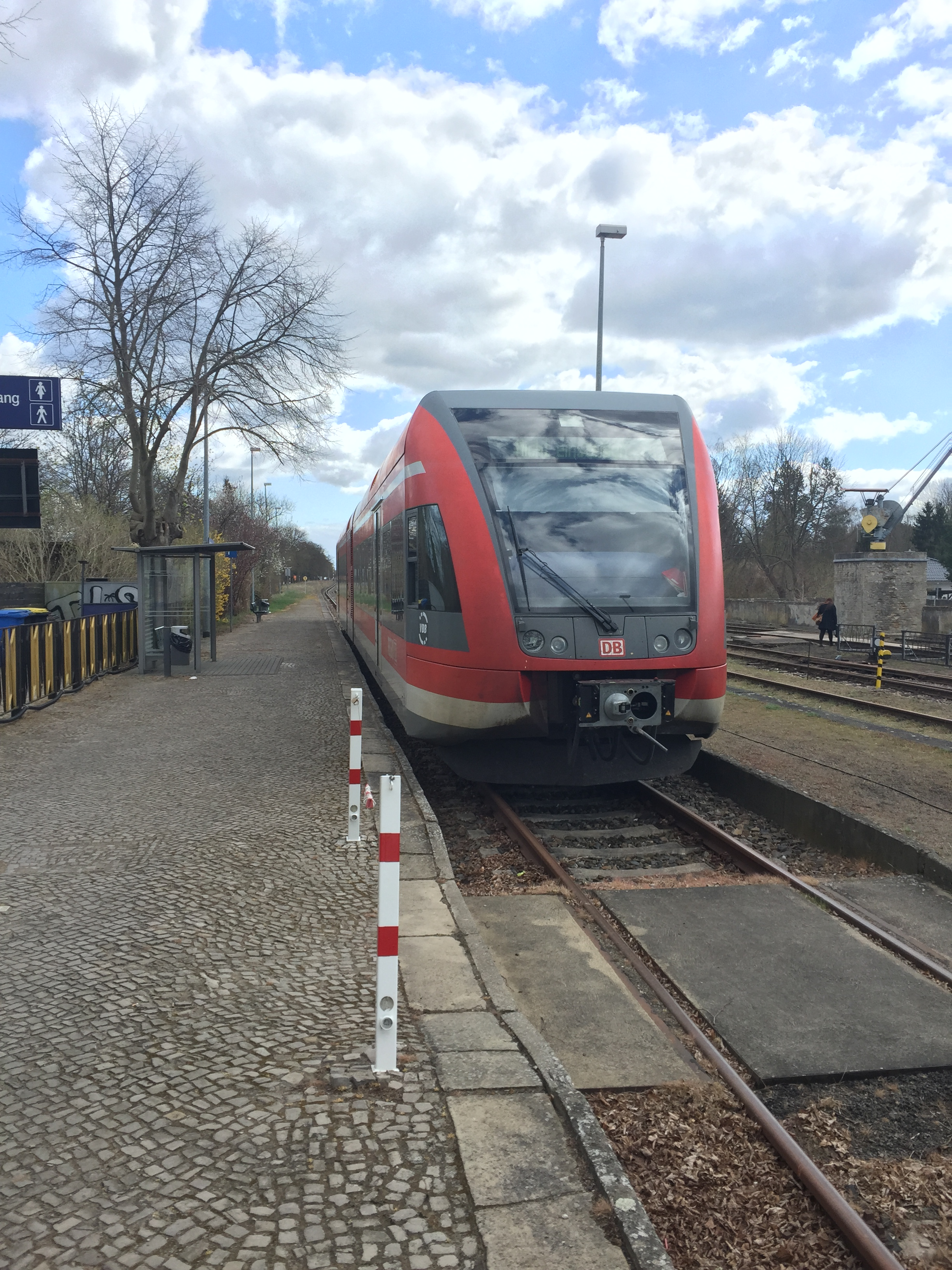 RB 54 im Bahnhof Rheinsberg (Mark)